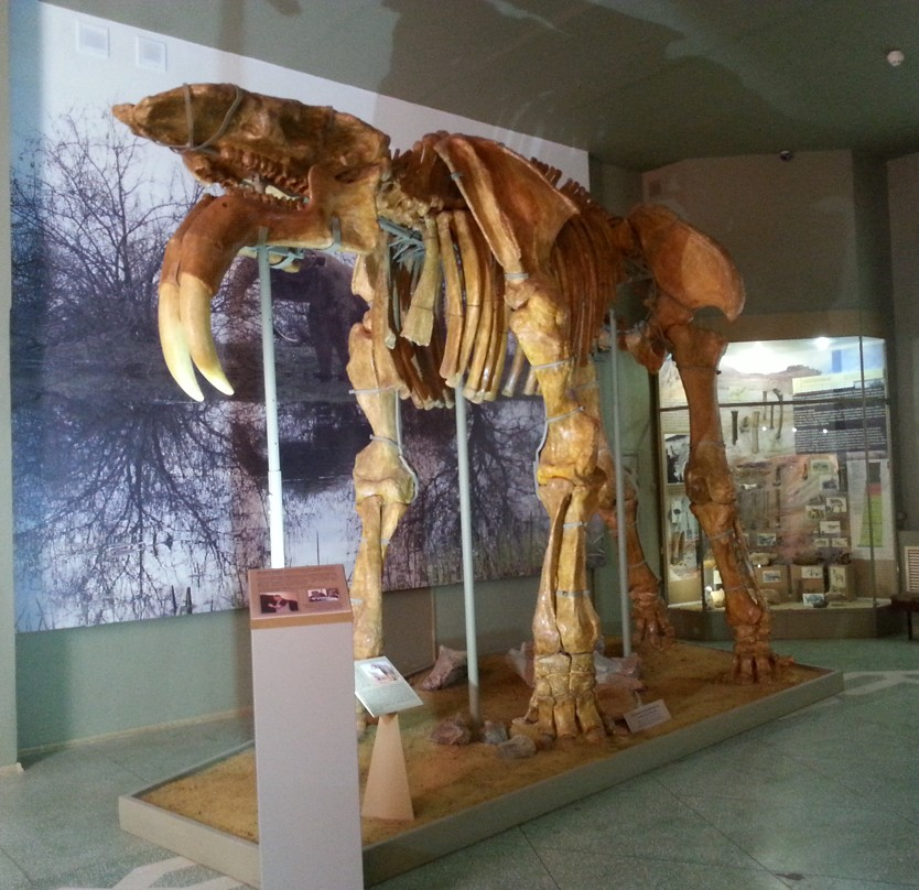 Скелет динотерия в Азовском историко-археологическом и палеонтологическом музее